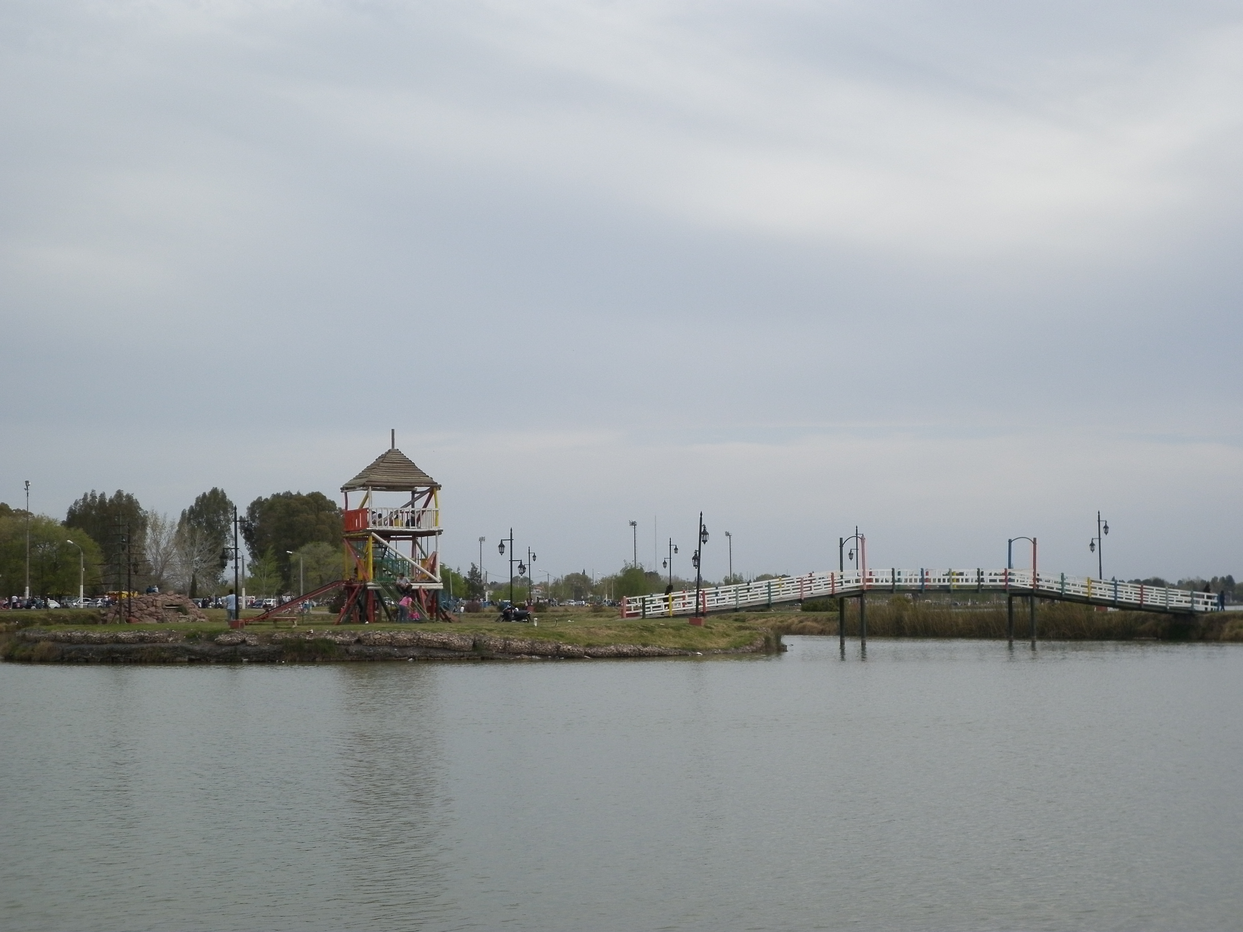 Se trata de un mirador en el parque recreativo Laguna Don Tomás en Santa Rosa (La Pampa), que se encuentra sobre una isla artificial en una de las lagunas en el parque.